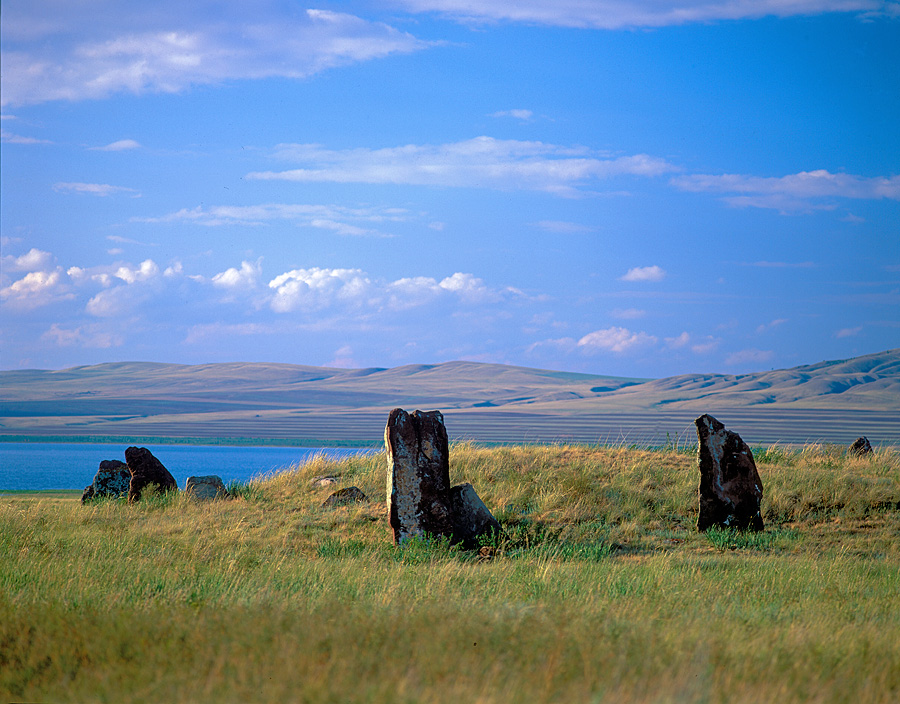 Хакасский заповедник. Могильные камни - памятники Карасукской культуры.